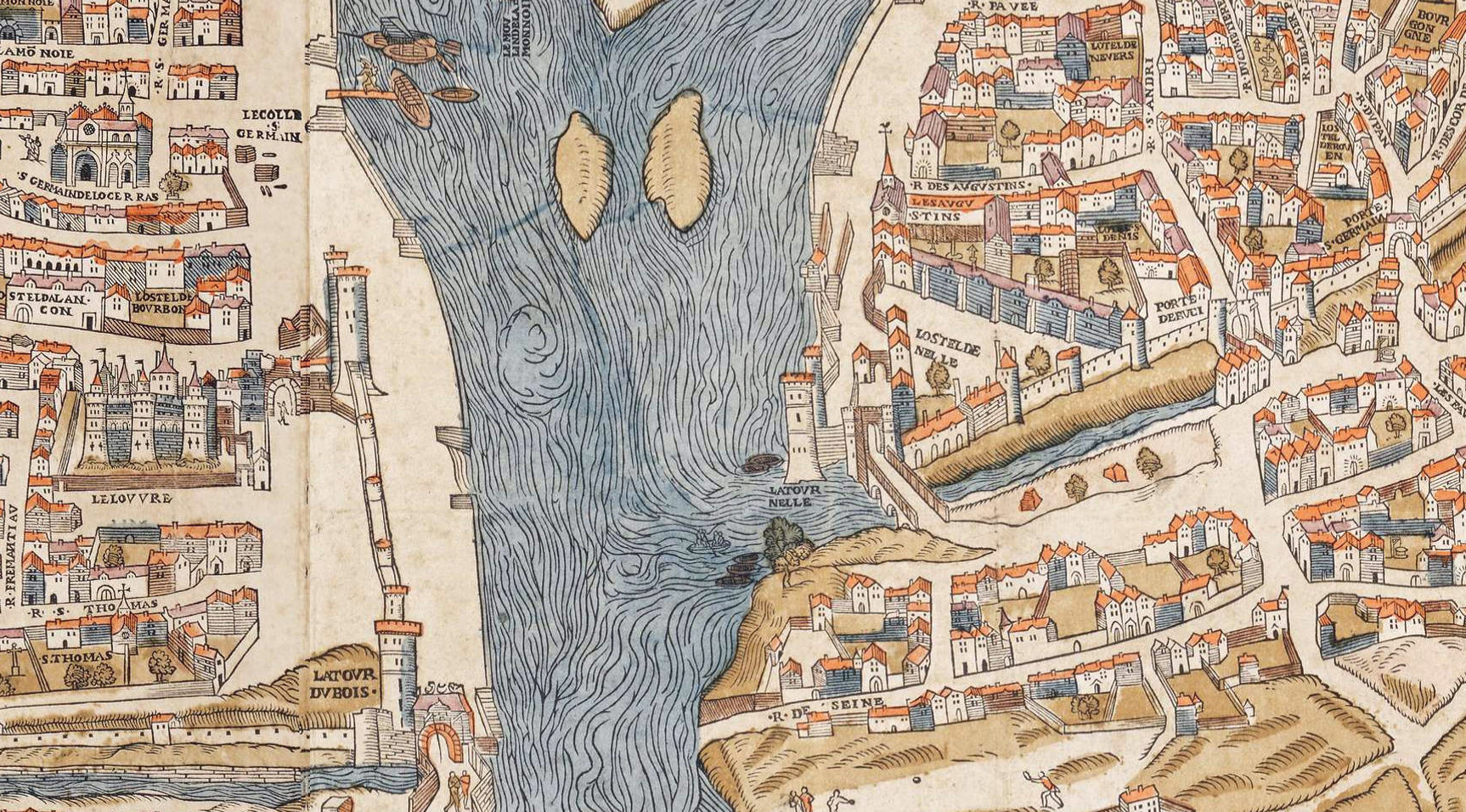 Plan de Paris vers 1550 - Extrait du plan de Tuschet et Hoyau - Tour et Hôtel de Nesle face au Louvre